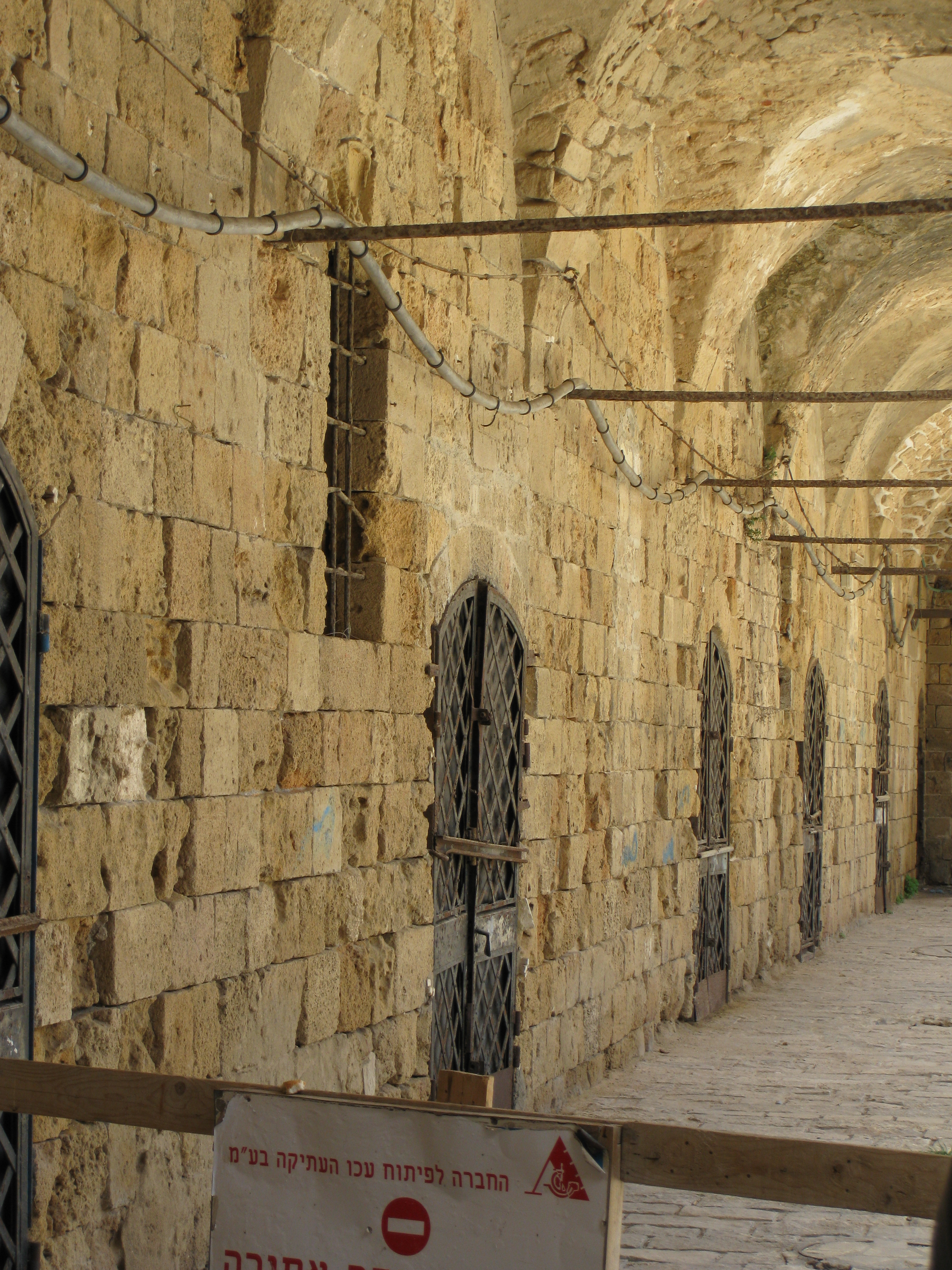 Acco (Acre, Akko) - Khan al-Umdan עכו - חאן אל עומדאן